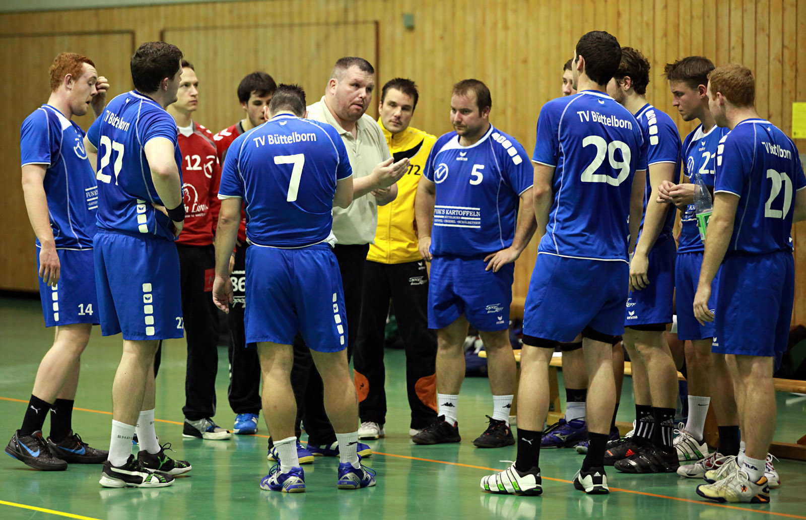 Eine Auszeit bei einem Handballspiel. Aufgenommen beim Spiel TV Büttelborn II gegen TV Groß-Rohrheim (Bezirksliga A), am 20. Oktober 2012 in Büttelborn (Klein-Gerau).